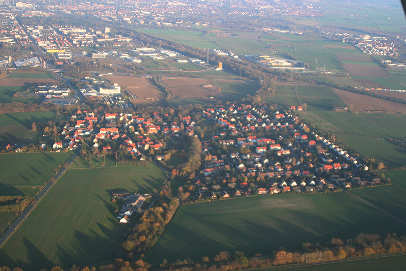 Groß Ellershausen. Luftaufnahme.